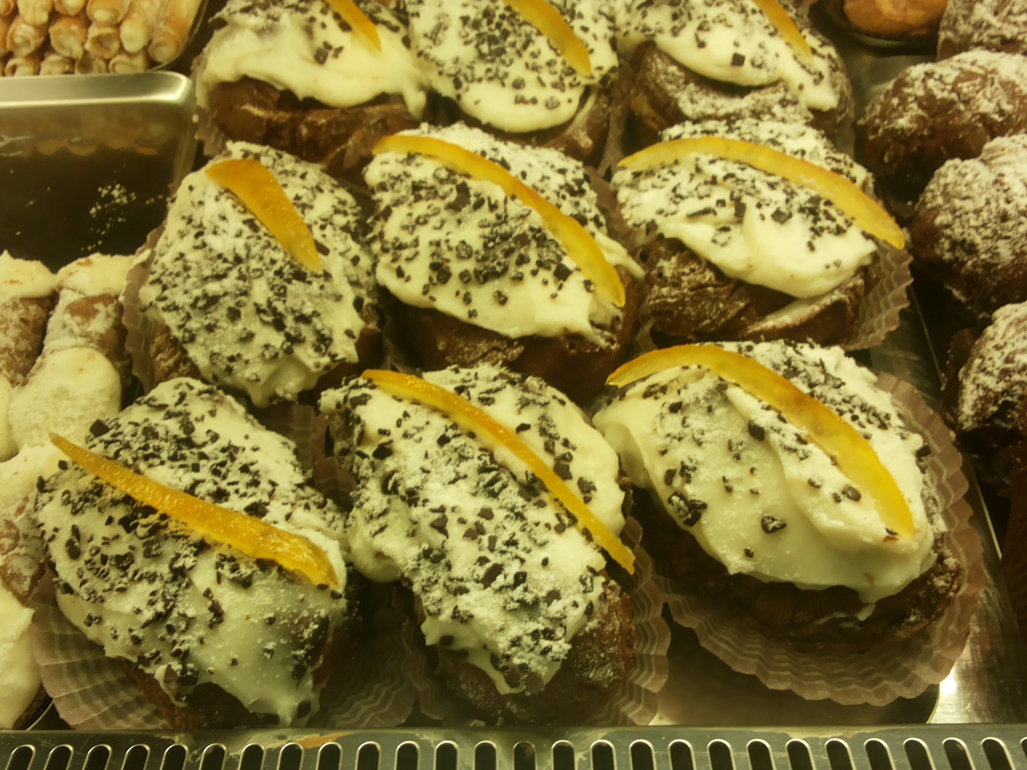 Sfince di San Giuseppe ad Alcamo Marina (produzione: Bar Paziente)